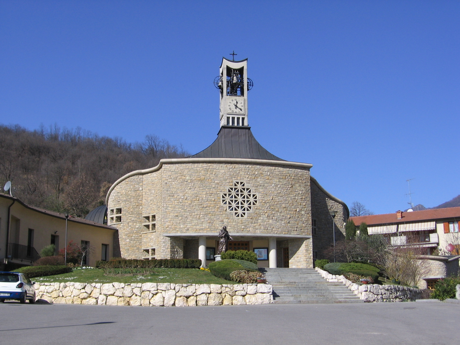 Chiesa fraz. Gavarno, Nembro, Bergamo, Italy